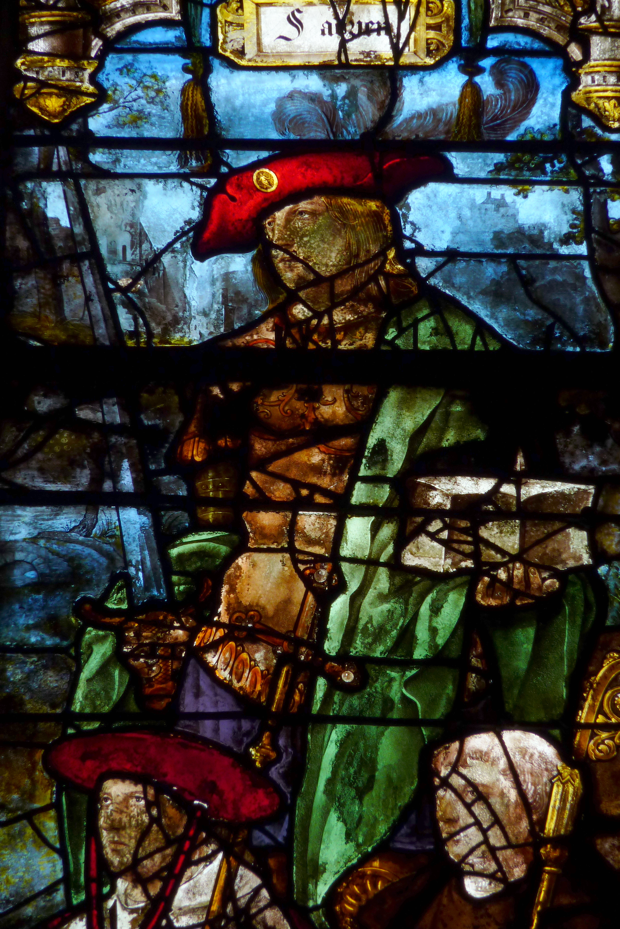 Bleiglasfenster Nr. 8 (16. Jahrhundert) in der katholischen Pfarrkirche Saint-Martin (Collégiale Saint-Martin) in Montmorency, Darstellung: hl. Saint Adrian von Nikomedien (siehe: Dominique Foussard, Charles Huet, Mathieu Lours: Églises du Val-d'Oise. Pays de France, Vallée de Montmorency, Société d'Histoire et d'Archéologie de Gonesse et du Pays de France, 2. Auflage, Gonesse 2011, ISBN 9782953155426)